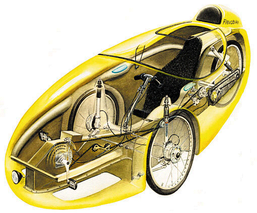 éclaté limit